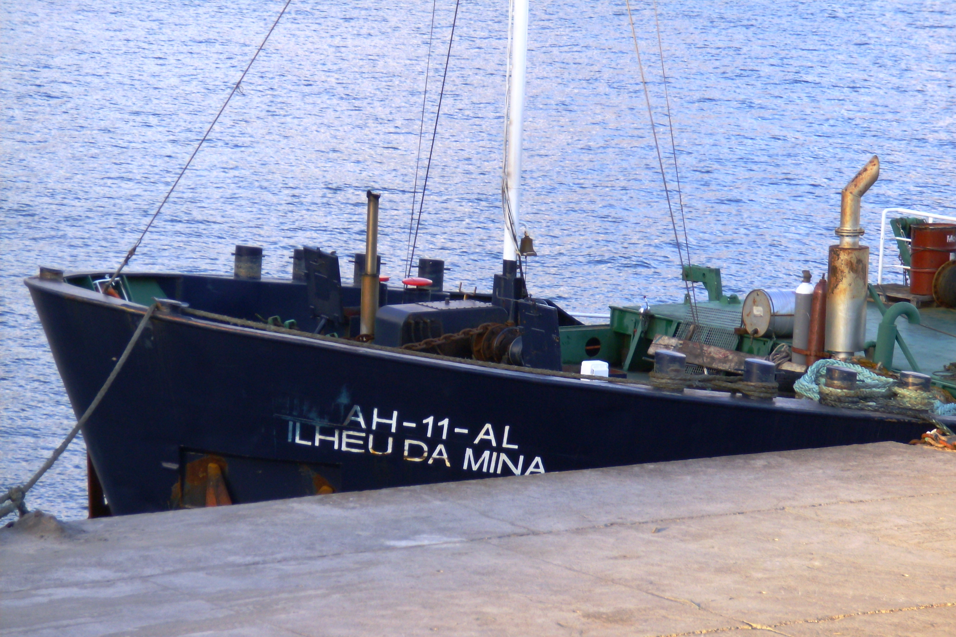 N/D Ilhéu da Mina, porto de Vila do Porto, ilha de Santa Maria, Açores. IMO 7533288 Callsign: CSMX9